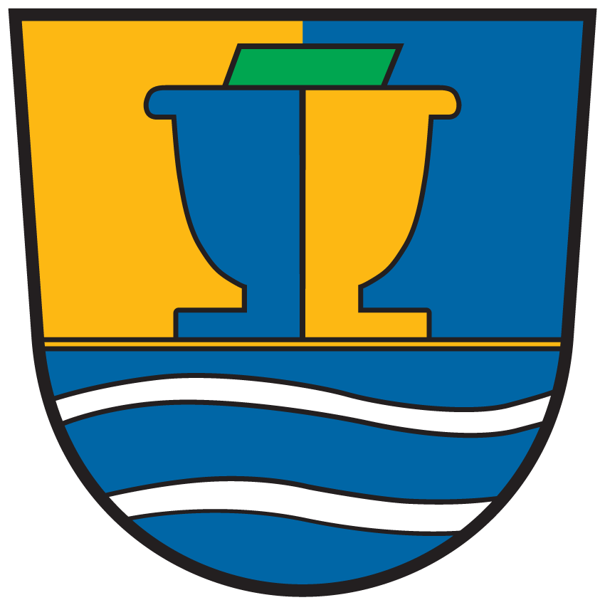 Wappen von Lavamünd